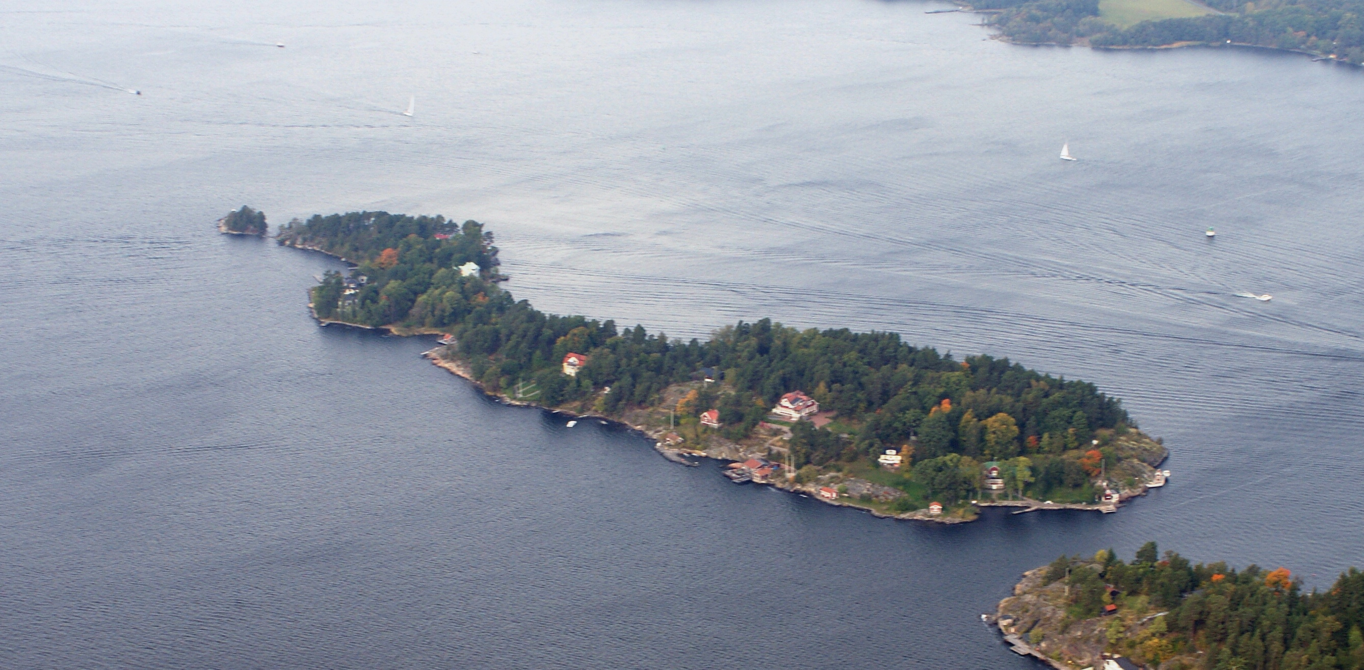 Ön Västra Granholmen (ej att förväxla med ön Granholmen vid Möja) nära Vaxholm sedd från helikopter. På ön finns Granholmen brygga.